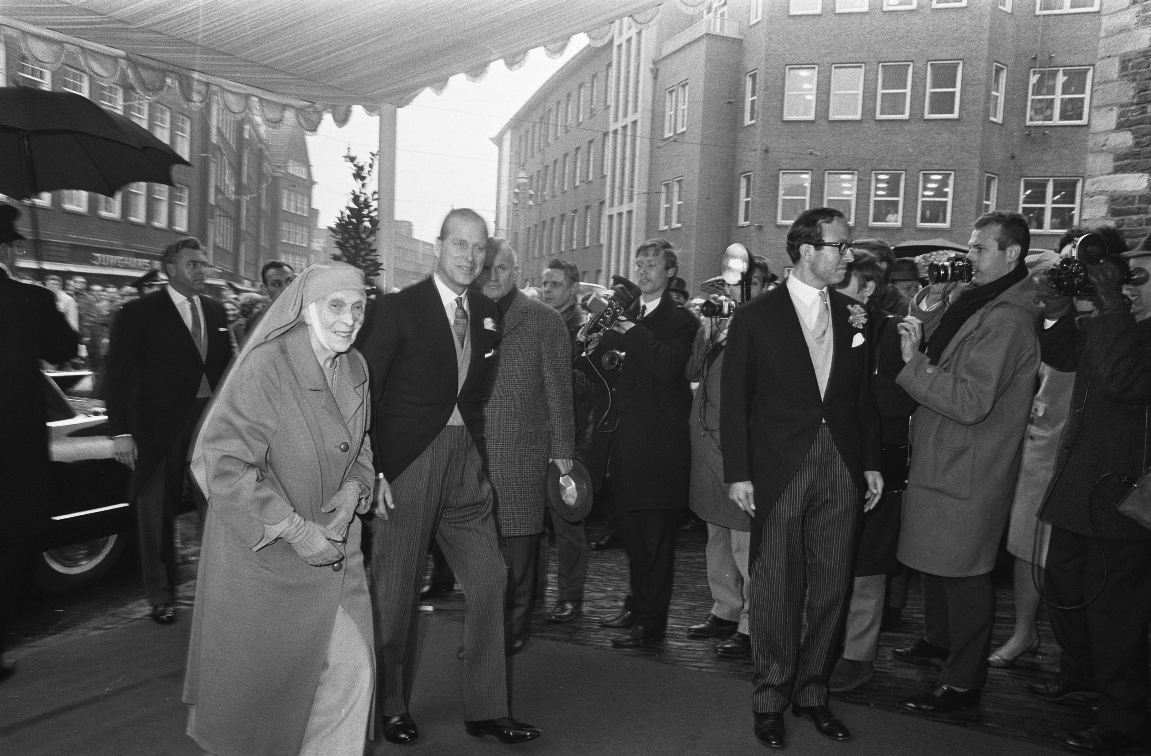 Collectie / Archief : Fotocollectie Anefo Reportage / Serie : Huwelijk prins Karl von Hessen en gravin Yvonne Szapary in Den Haag Beschrijving : Aankomst prins Philip (Engeland) en zijn moeder bij de kerk Datum : 18 april 1966 Locatie : Den Haag, Zuid-Holland Trefwoorden : aankomsten, huwelijken, kerken, vorstenhuizen Persoonsnaam : Philip, prins van Groot-Brittannië Fotograaf : Fotograaf Onbekend / Anefo Auteursrechthebbende : Nationaal Archief Materiaalsoort : Negatief (zwart/wit) Nummer archiefinventaris : bekijk toegang 2.24.01.05 Bestanddeelnummer : 919-0424